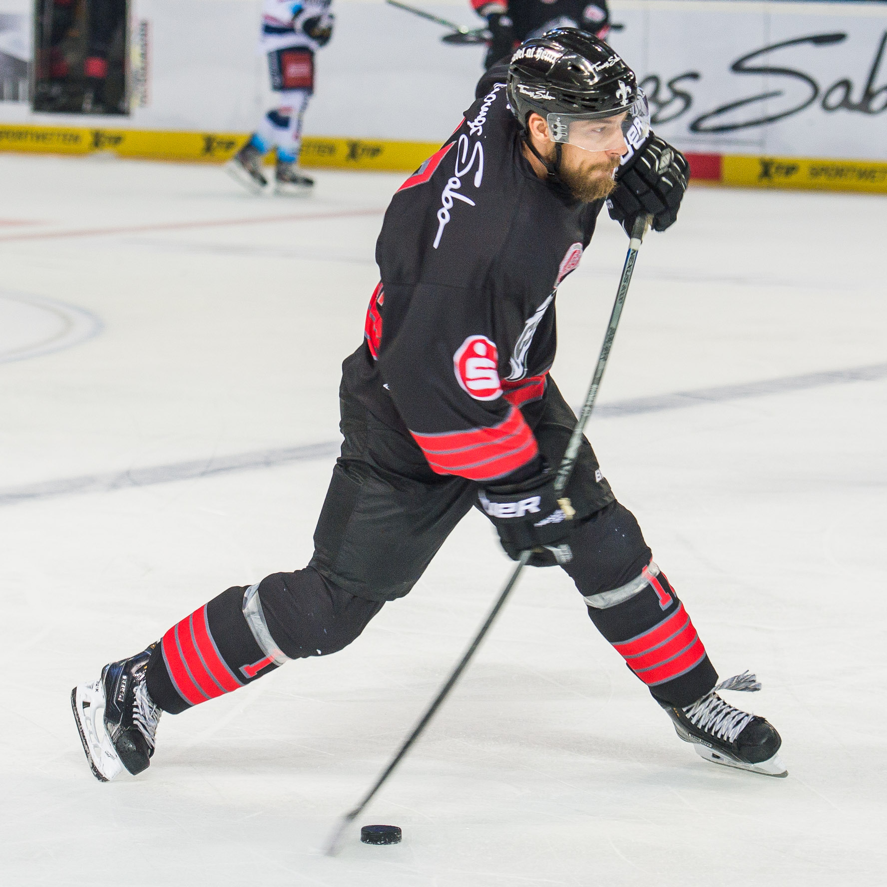 Arena Nürnberger Versicherungen,DEL,Eishockey,Patrick Reimer,Thomas Sabo Ice Tigers Nürnberg